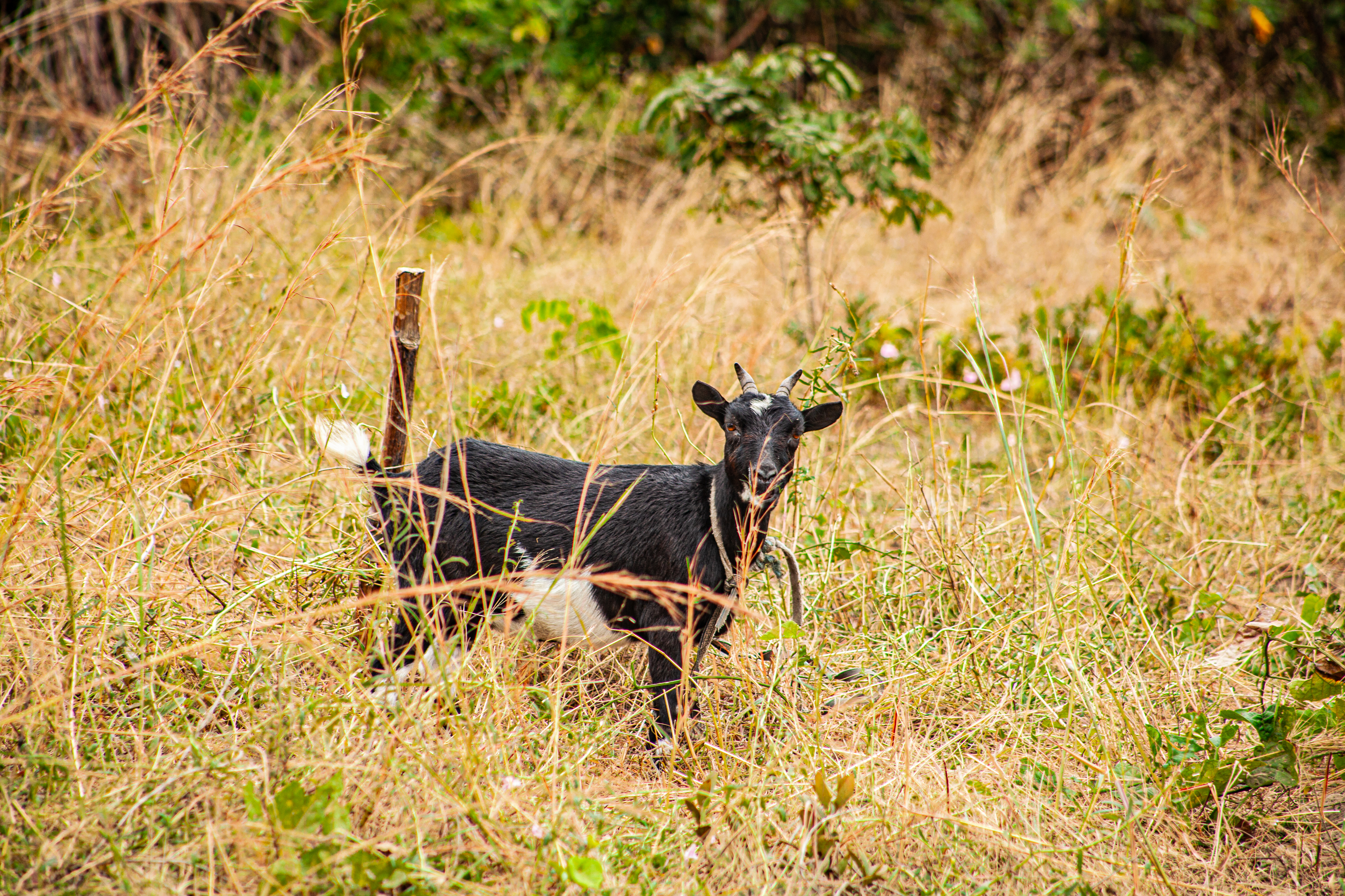 Grilled lamb - Congo style